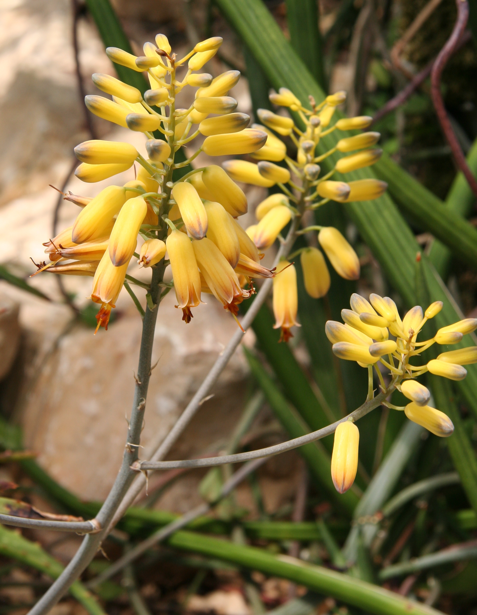 Aloe deserti in der Sukkulenten-Sammlung Zürich